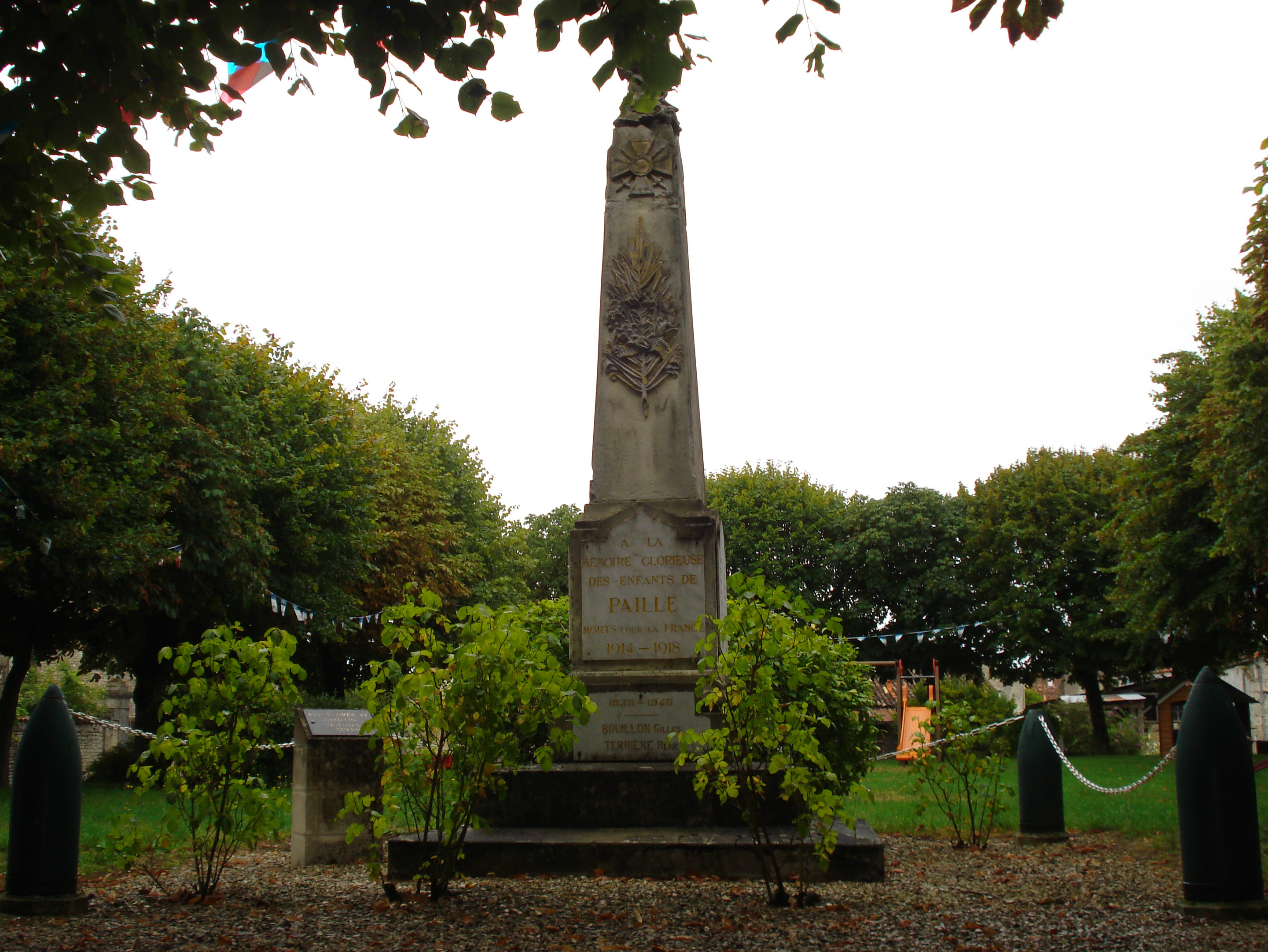 Le Monument aux morts sur la place de Paillé (Charente-Maritime)